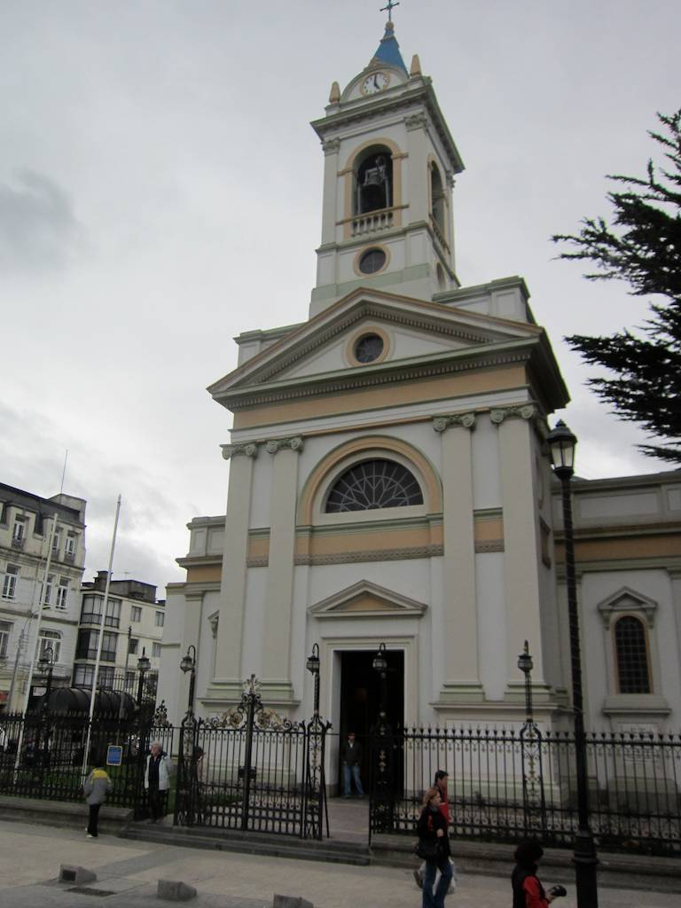 Catedral de Punta Arenas